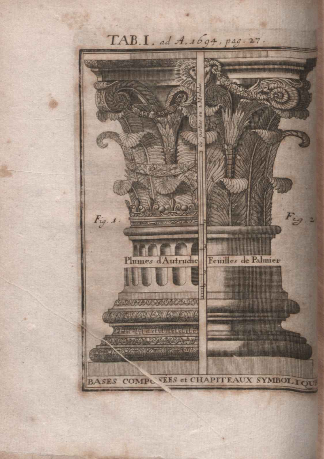 Illustration